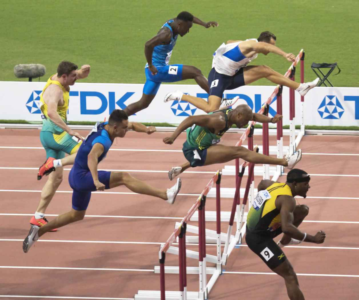 DOH40047 110mH men heats